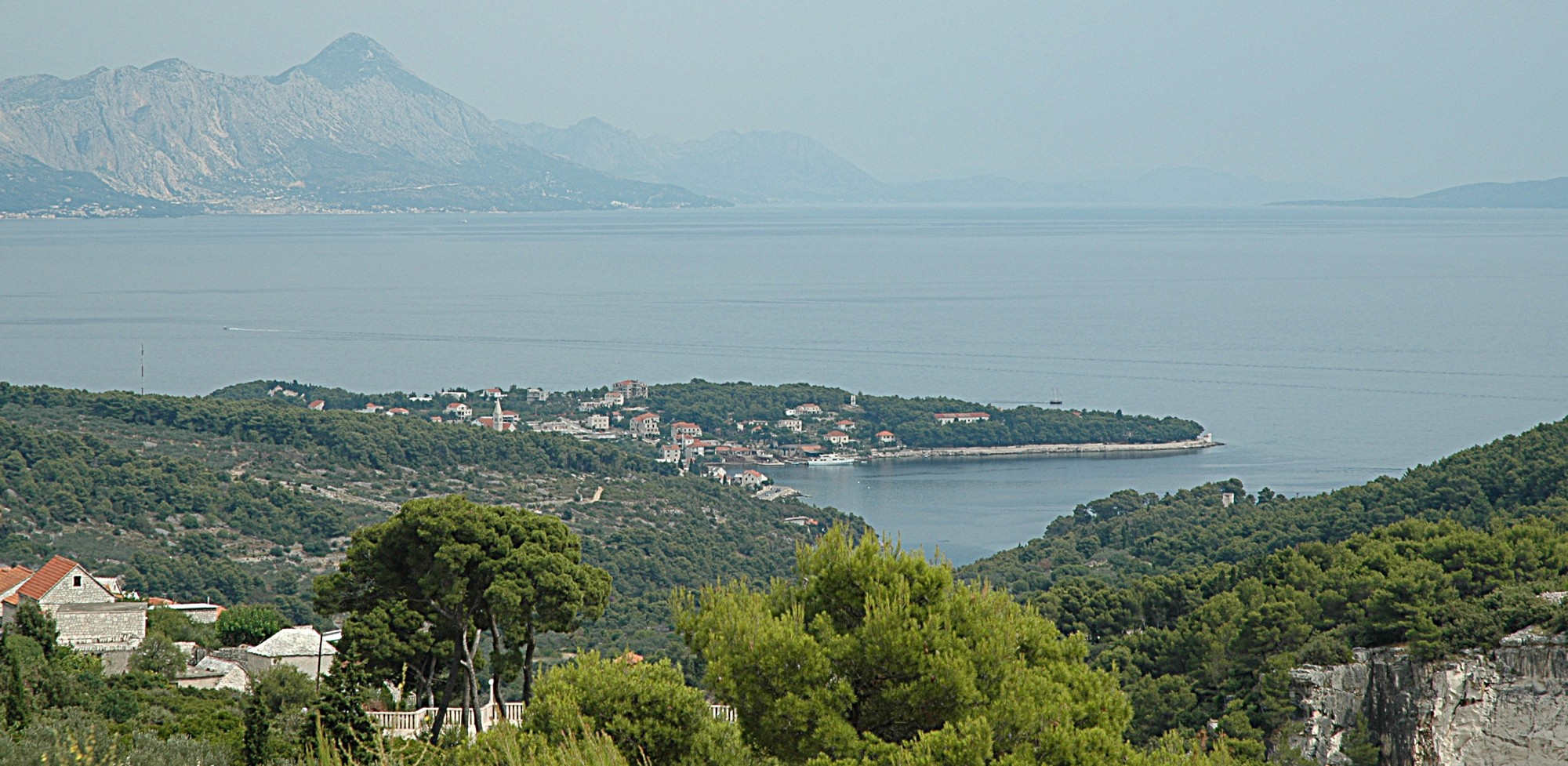 Bildbeschreibung: Blick von der Insel Brac auf das dalmatinsche Festland. Quelle: selbst fotografiert Fotograf/Zeichner: Wolfgang Hunscher, Dortmund Datum: 26.07.2005